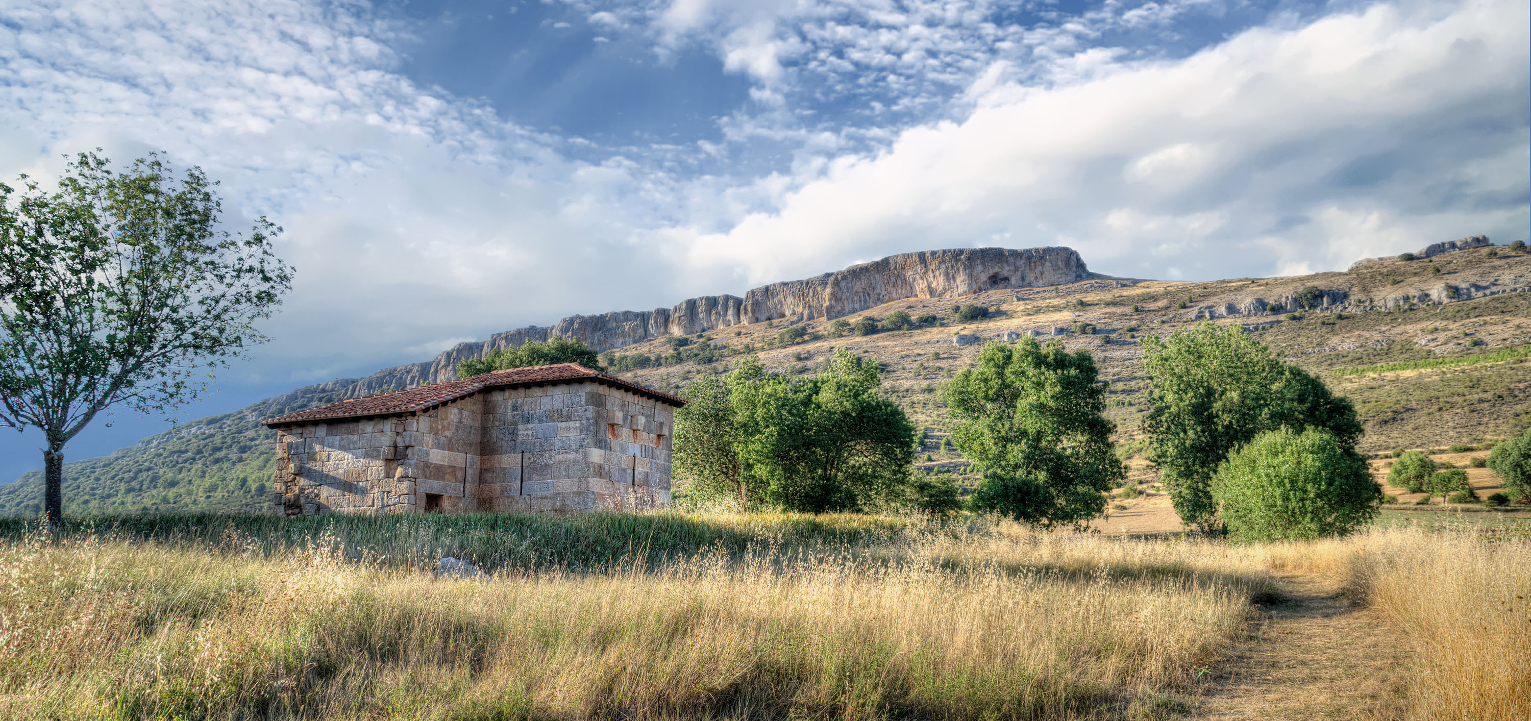 Ermita de origen visigodo localizada en la afueras de Quintanilla de las Viñas, provincia de Burgos. Su origen se fecha en los siglos VII-VIII y actualmente sólo queda una parte de la edificación original con elementos decorativos tallados en grandes sillares, tanto en el interior como en el exterior.